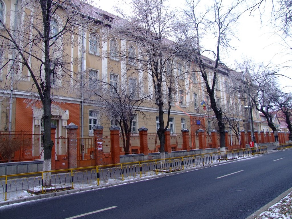 Colegiul Național „Andrei Mureșanu” Iarna